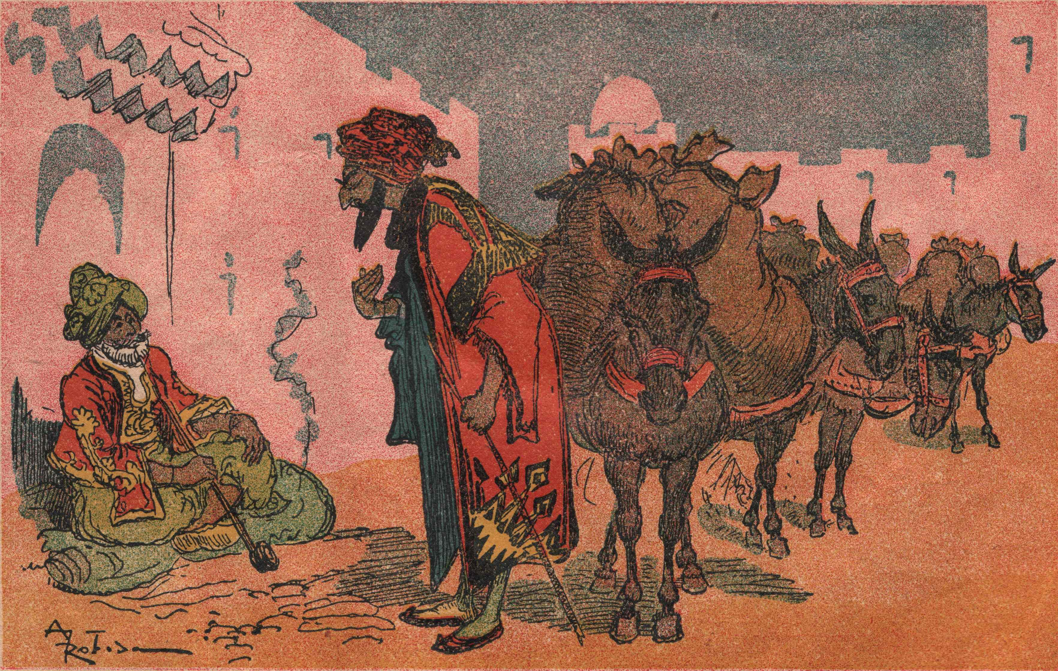 Illustration d'Alibaba et les quarante voleurs par Albert Robida